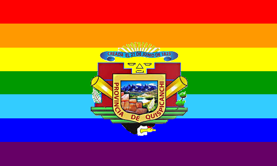 Bandera de la provincia de Quispicanchi en el departamento del Cusco, Perú